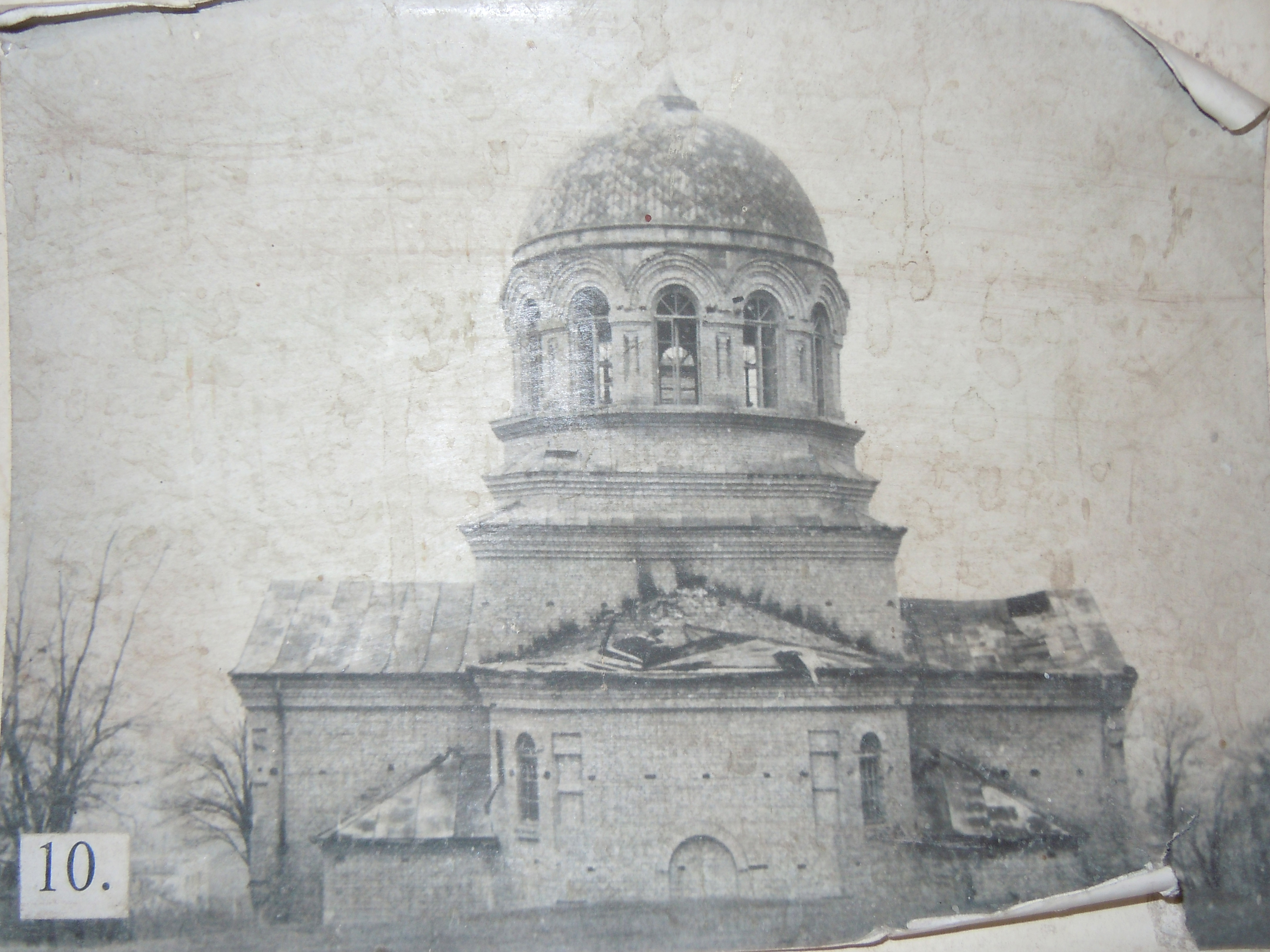 Церква, с. Криничне, Ювілейна вул.